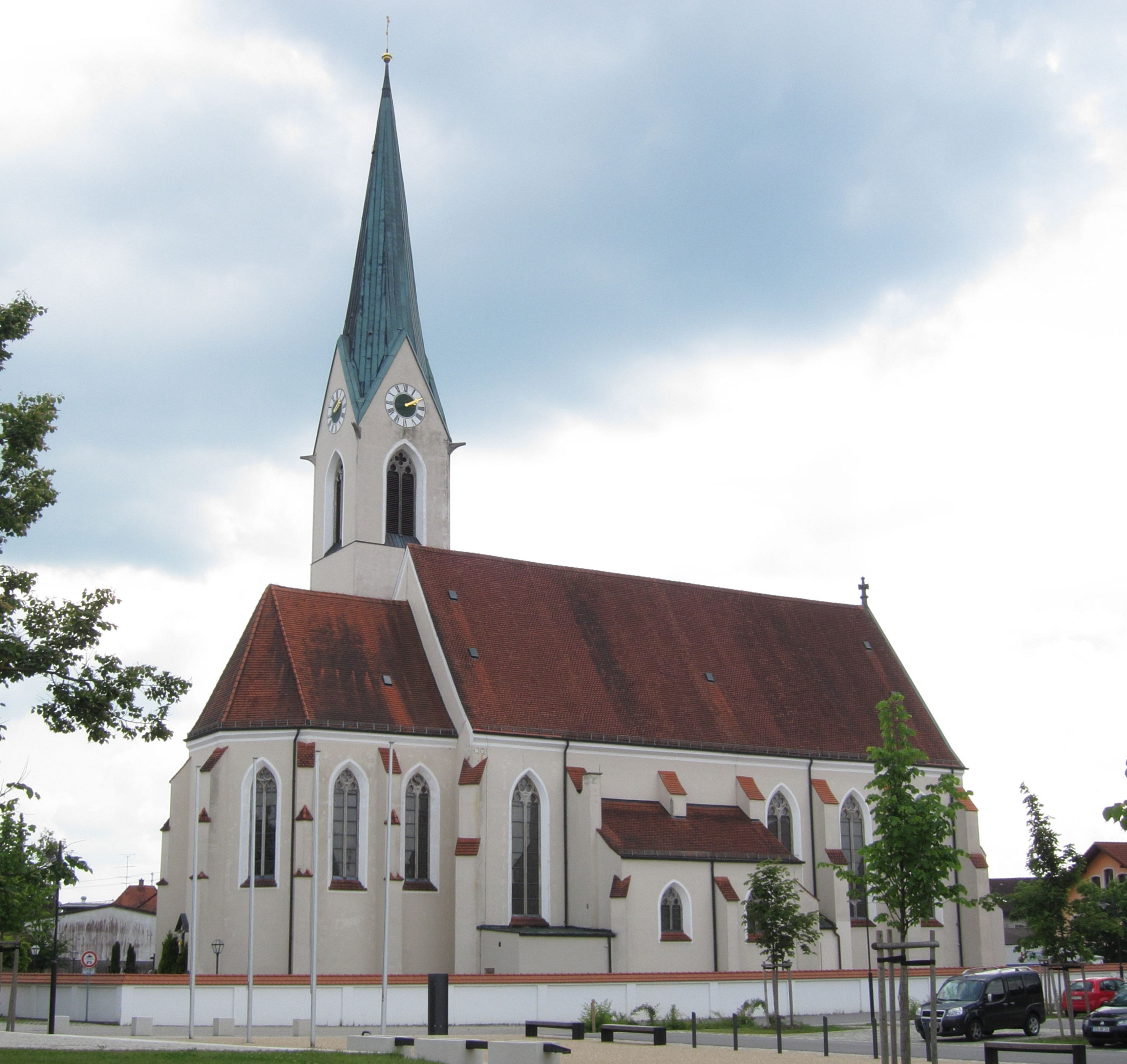 Hohenlinden, Pfarrkirche St. Josef Veränderungen zur Bildquelle: links und rechts zugeschnitten, Pixelzahl erhöht, nachgeschärft.